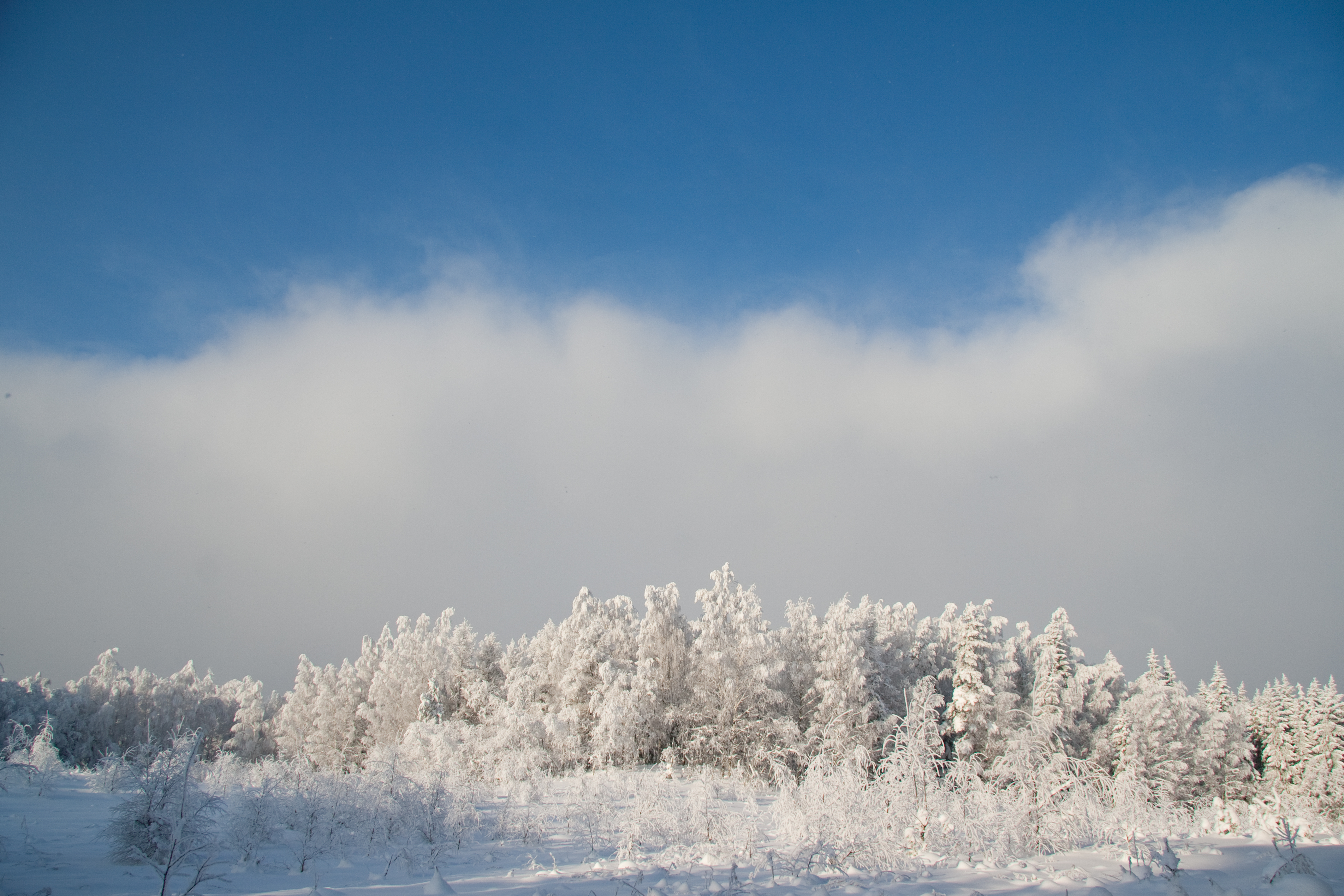 Saarnakõrve külas Harjumaal